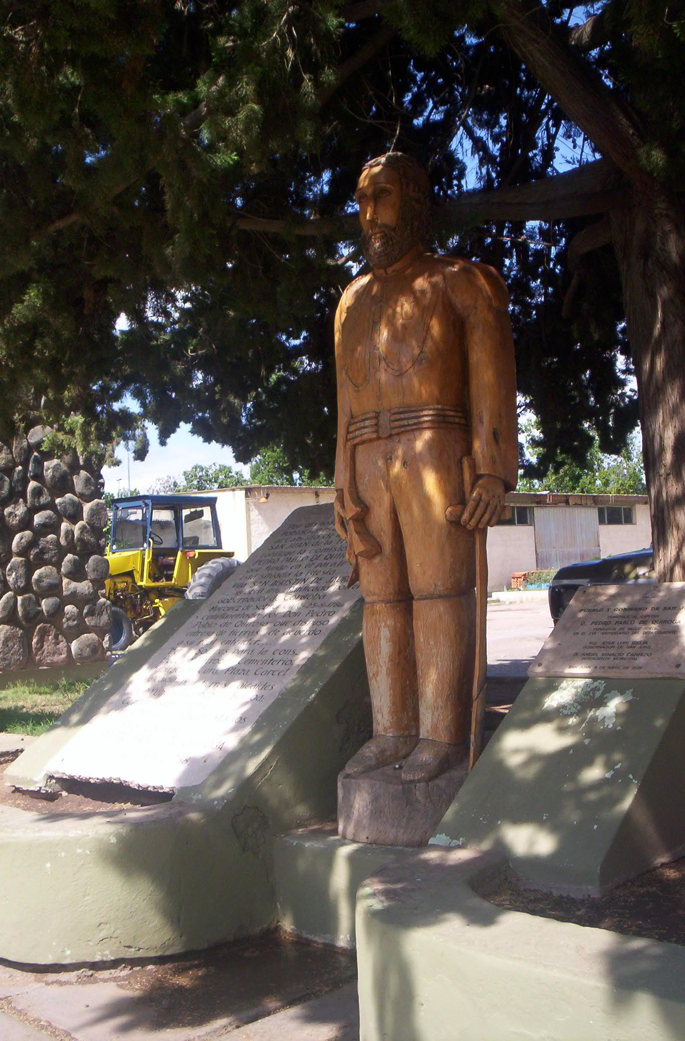 Vista del monumento del fundador del departamento Valle Fértil, en la Villa San Agustín, San Juan Argentina